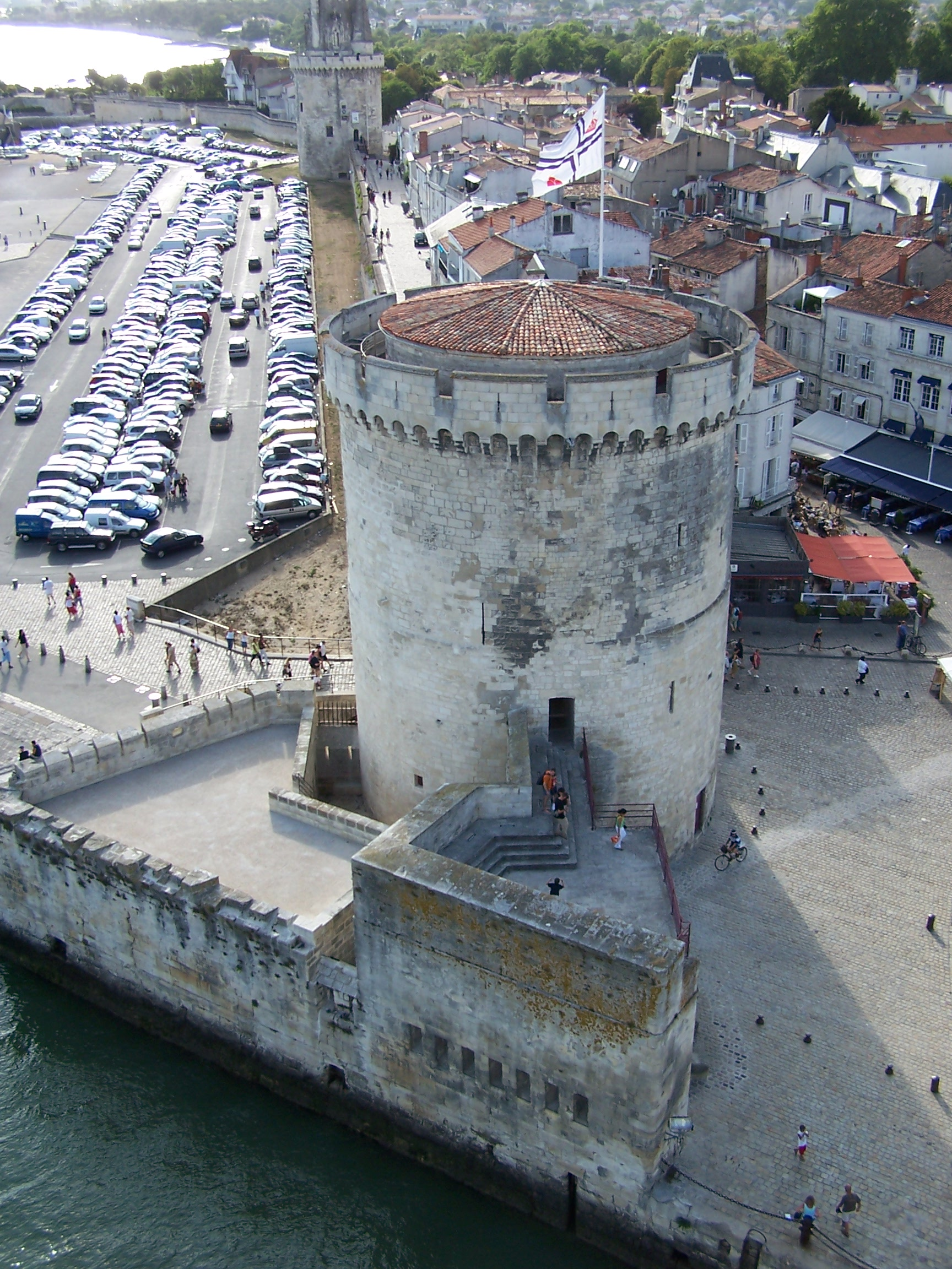 Photographie de la tour de la Chaîne, qui est, avec la tour Saint-Nicolas et la tour de la Lanterne, l'une des trois tours du front de mer de La Rochelle, et l'une des deux tours emblématiques du Vieux-Port. Elle a été classée monument historique en 1879.